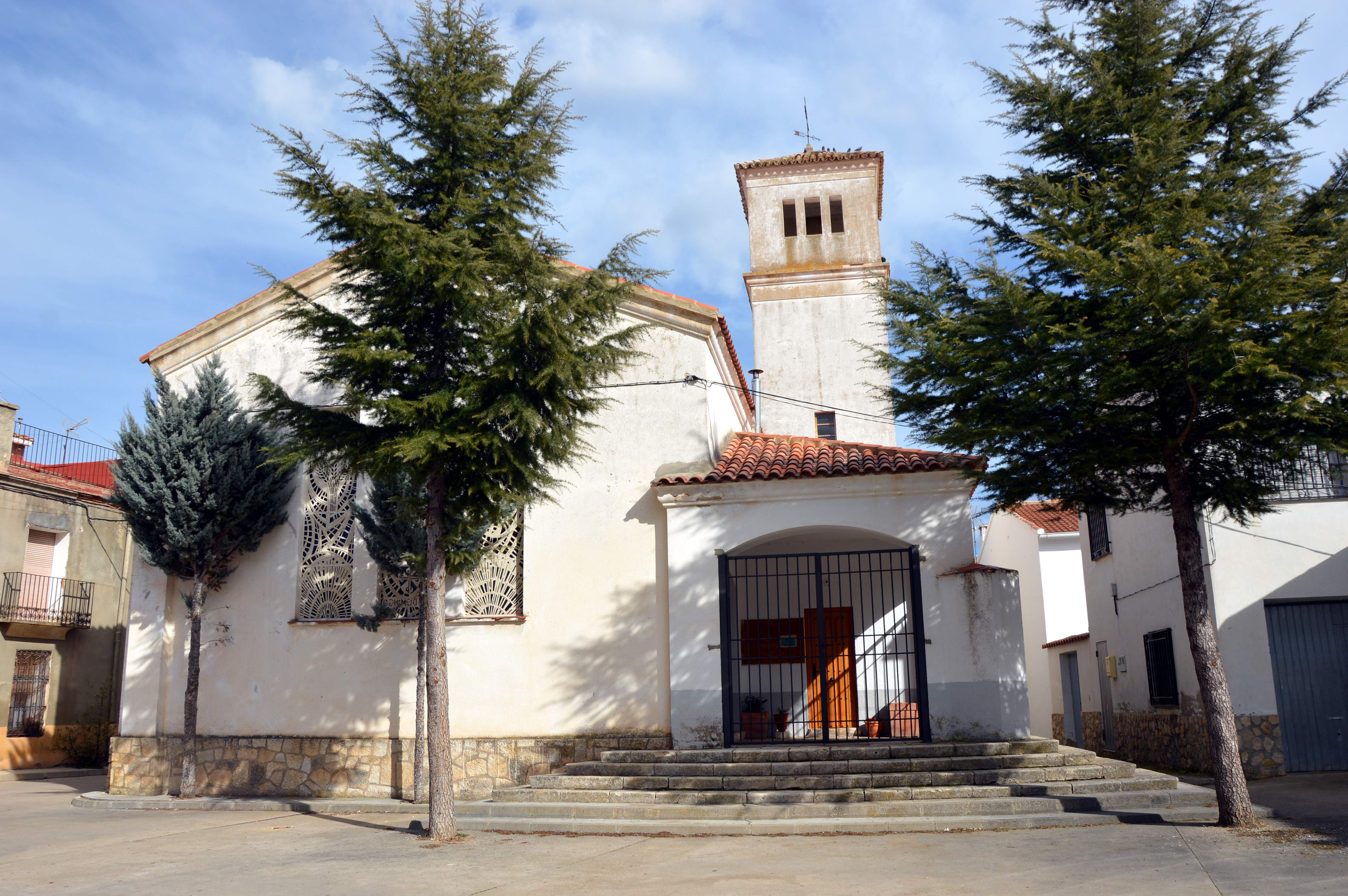 Vista frontal de la iglesia parroquial de Santo Domingo de Moya, Moya (Cuenca), 2017.